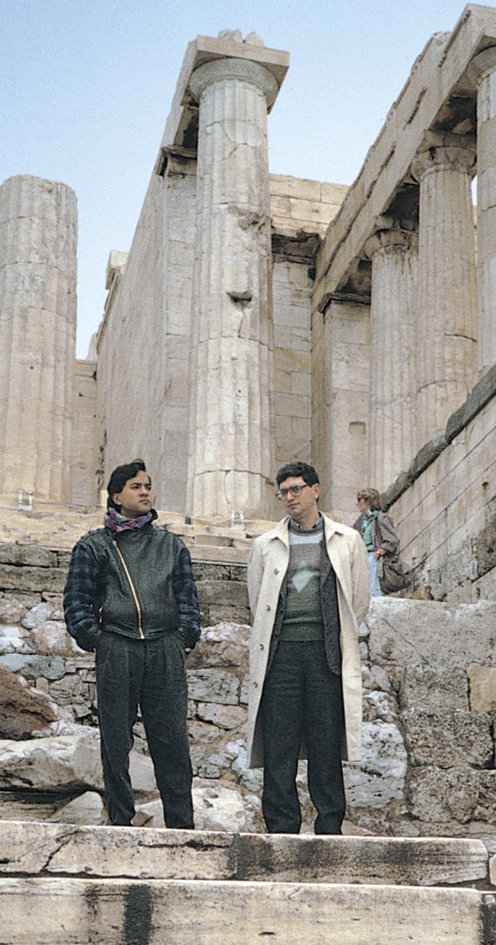 Maria Cannarella, Anish Kapoor and Demetrio Paparoni, Athens, 1983